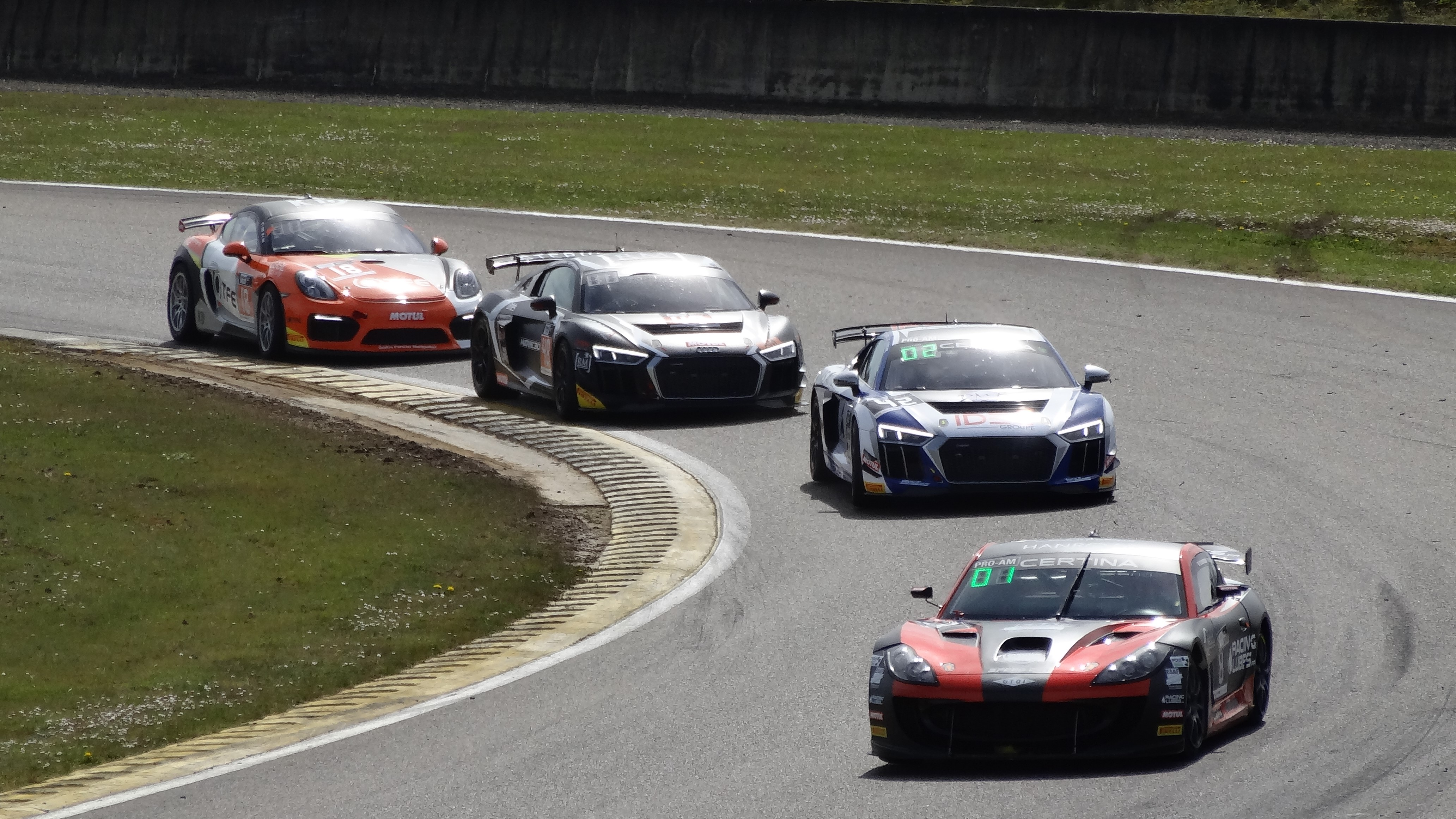 51e Coupes de Pâques (sport automobile), sur le Circuit Paul Armagnac à Nogaro (Gers) : FFSA GT4 France.